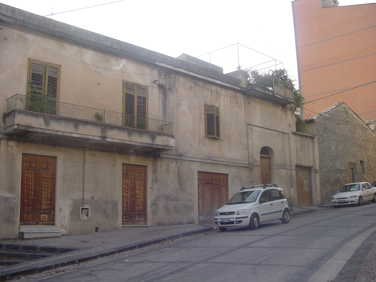 Palazzo Ducale